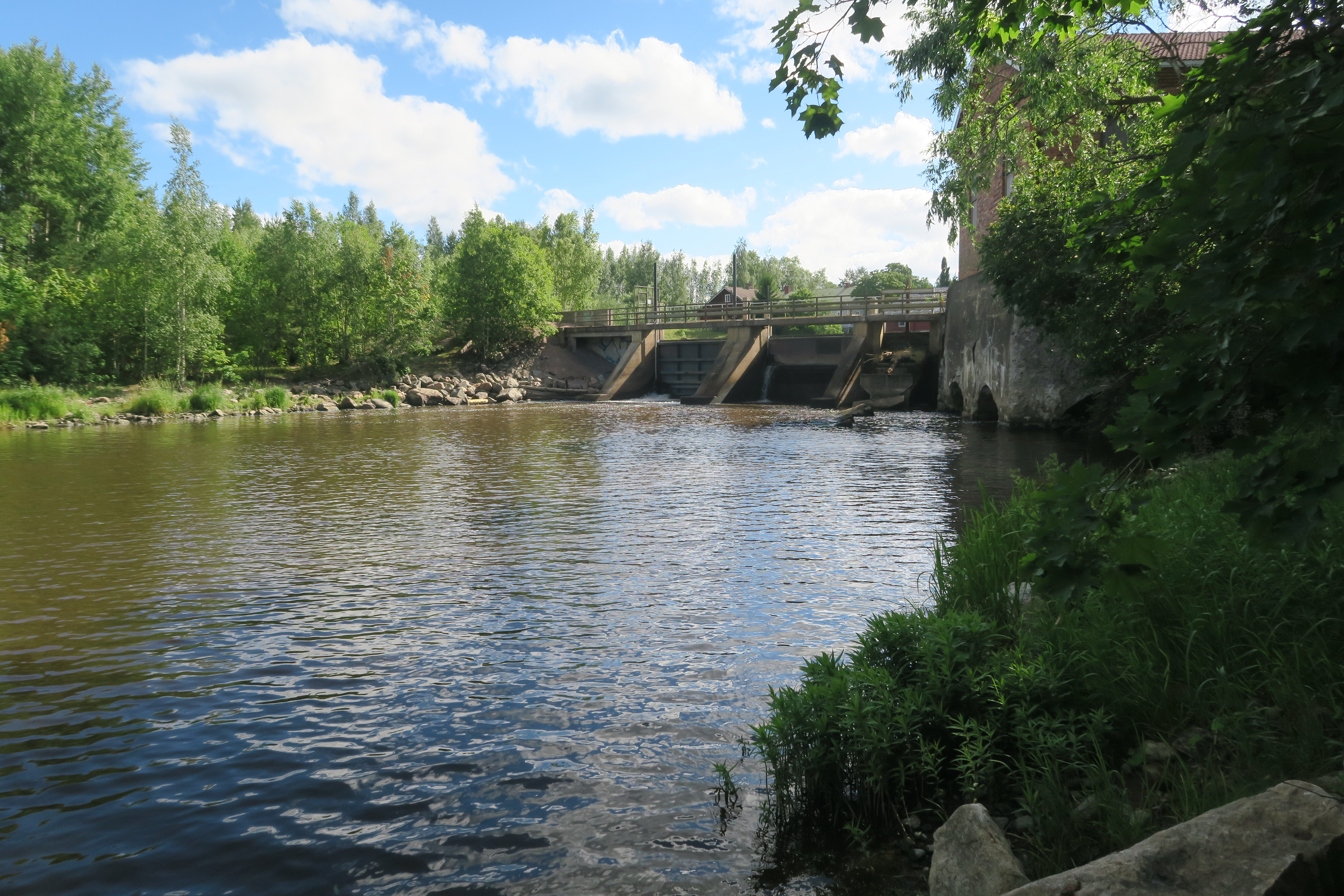 Vesikoski Loimijoessa Loimaalla heinäkuussa 2018